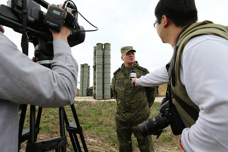 Работа российских и иностранных СМИ на авиабазе «Хмеймим» в Сирии